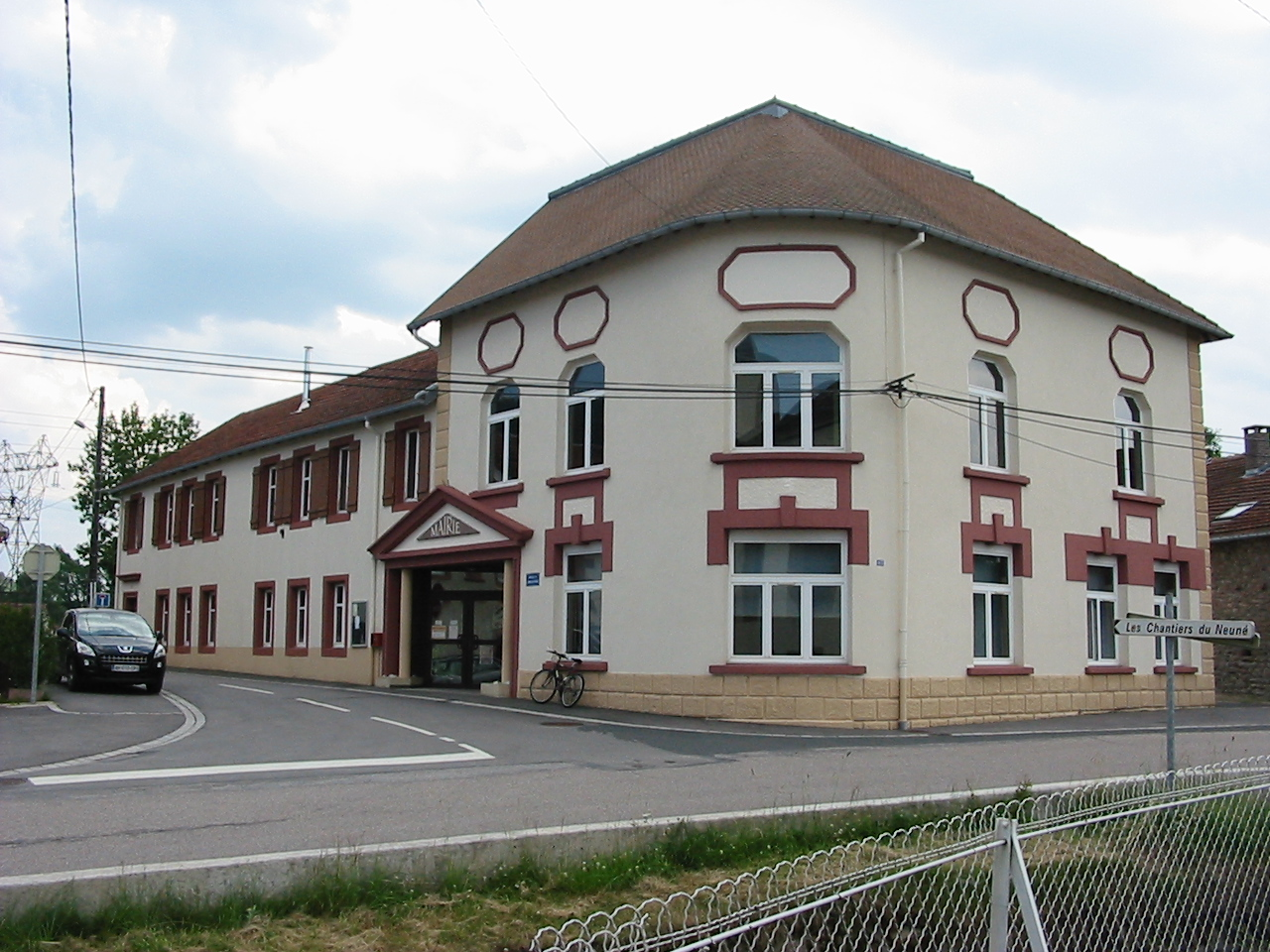 La mairie de La Houssière, commune des Vosges.